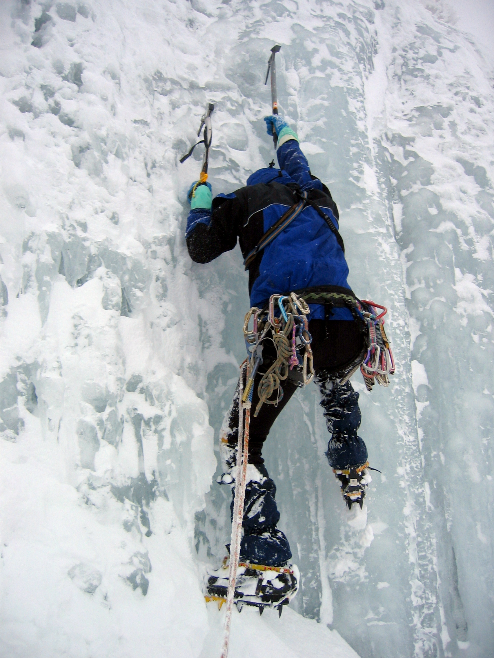 Eiskletterer am kleinen Engstligenfall (Schweiz).